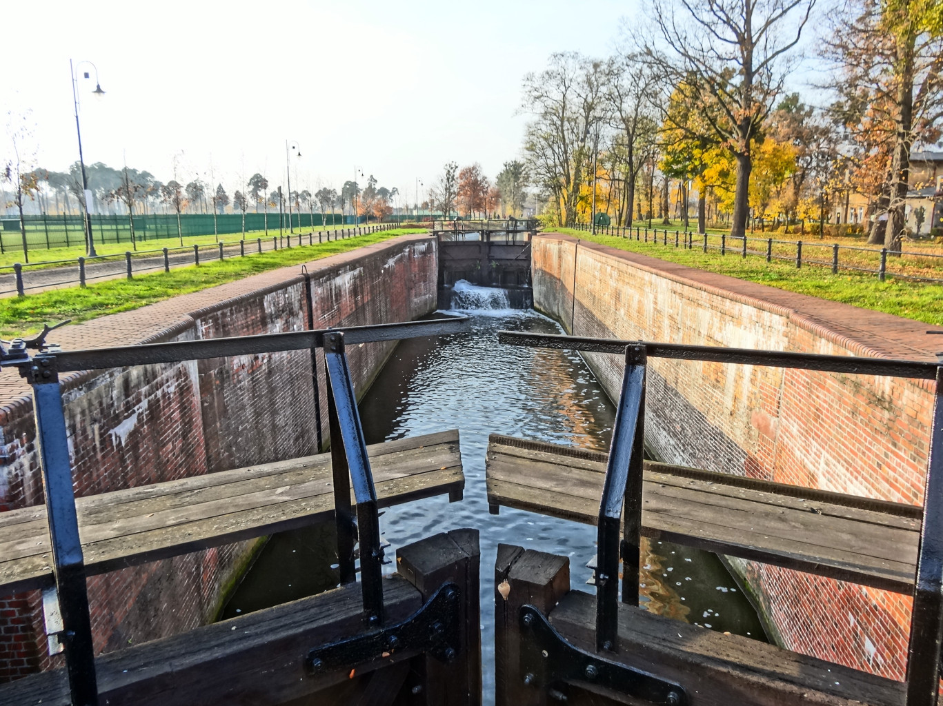 Śluza VI przy ul. Bronikowskiego w Bydgoszczy na Starym Kanale Bydgoskim